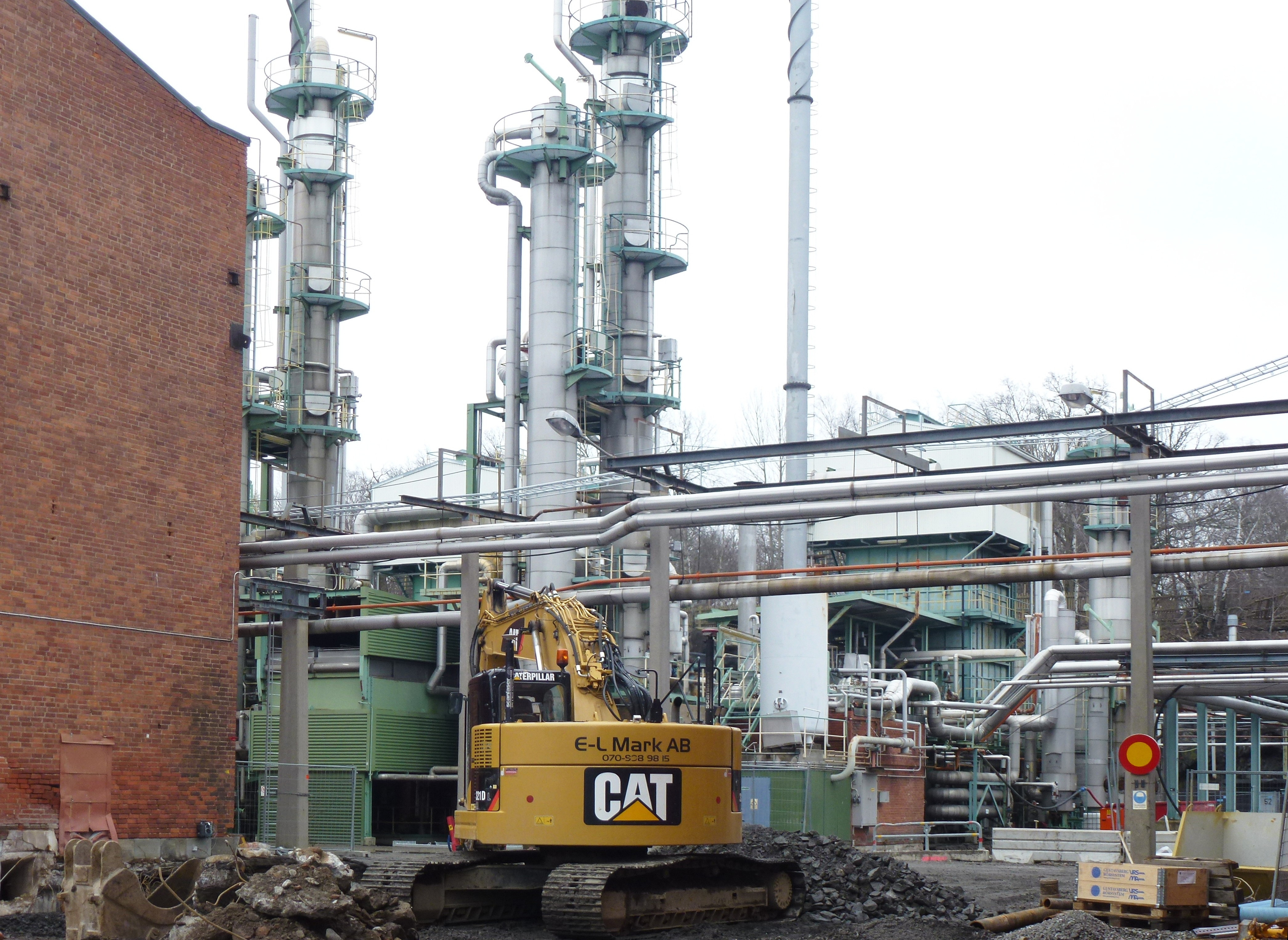 Spaltgasverkett vid Värtagasverket efter nedläggning